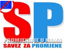 Logo političke stranke savez za promjene